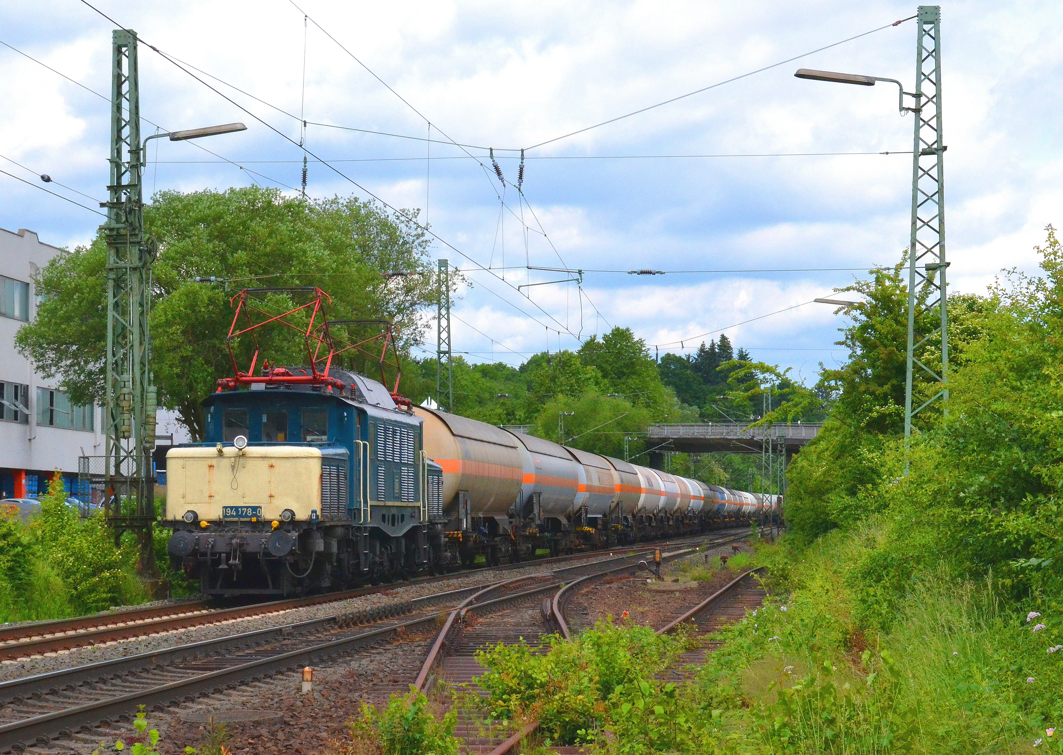 194 178-0 von Rail 4U mit einem Güterzug auf der Dillstrecke bei Sinn.